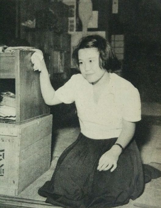 石川皐月（静岡県上野村村八分事件被害者）